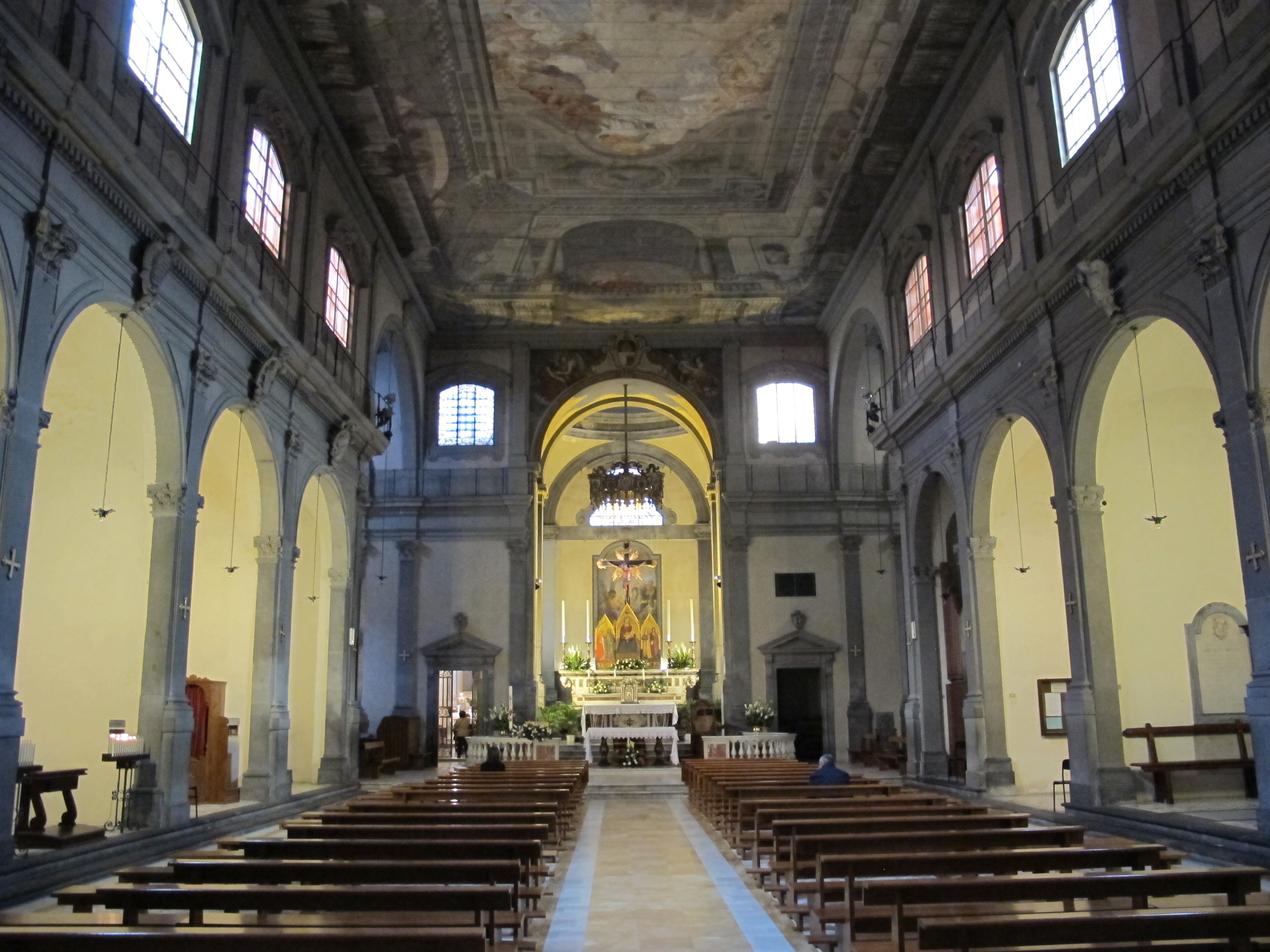 Empoli, collegiata, interno